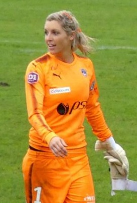 Erin Nayler avec les Girondins de Bordeaux lors de la 15ème journée de championnat contre l'OL, le 18 février 2018.